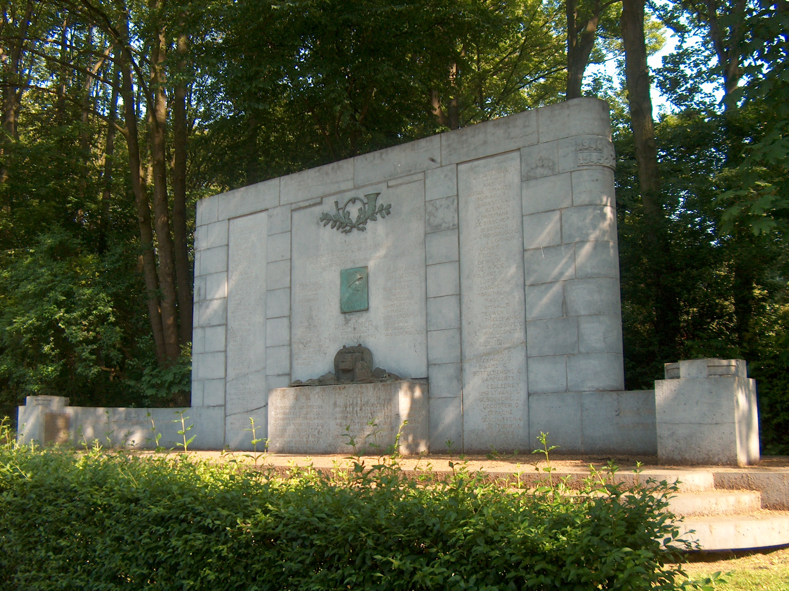 Monument Colonel Bremer avenue Louis Bertrand à Schaerbeek, Bruxelles, Belgique.